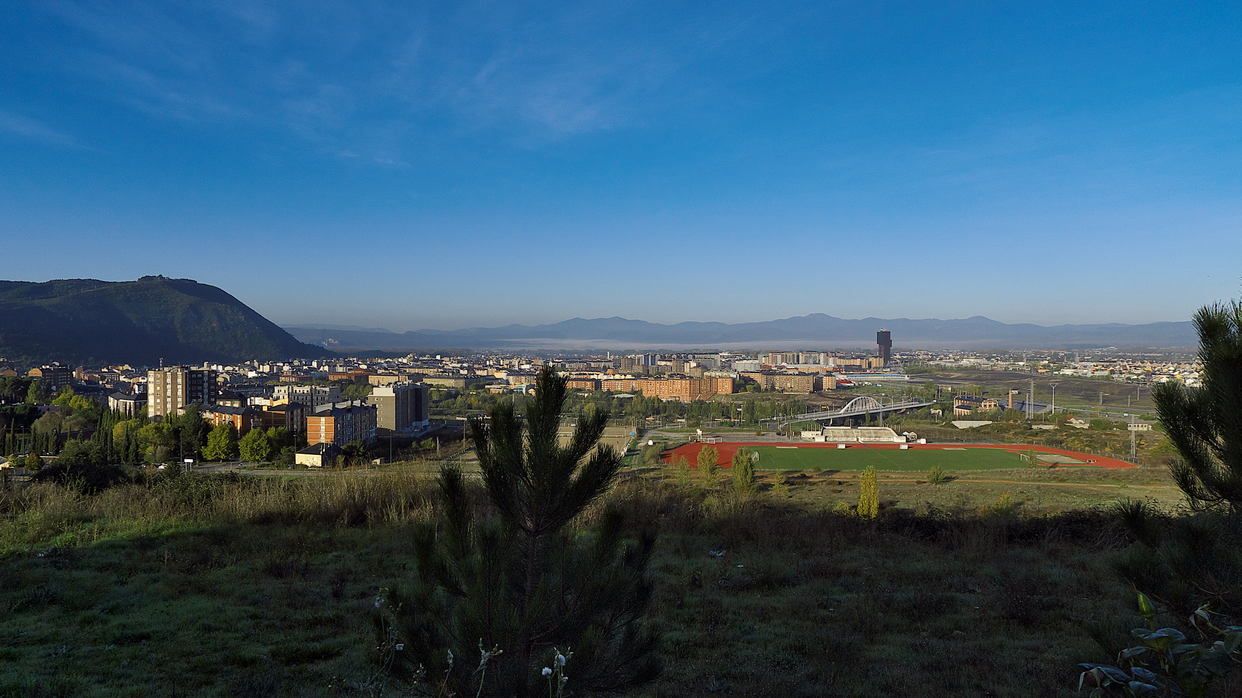 Vista de la ciudad de Ponferrada.